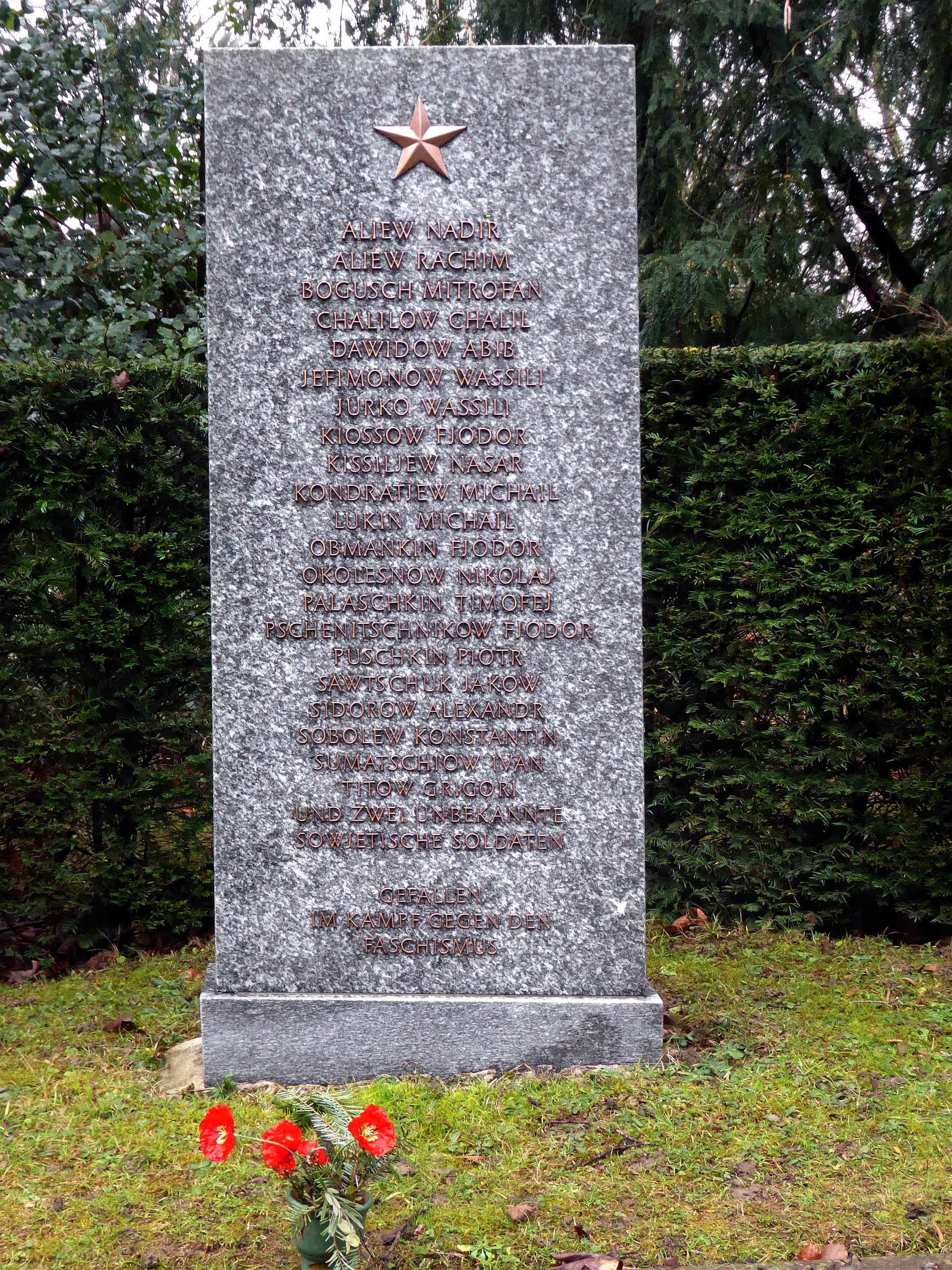 Gefallen im Kampf gegen den Faschismus. Gedenkgrabstätte auf dem Friedhof Hörnli, Riehen, Basel-Stadt